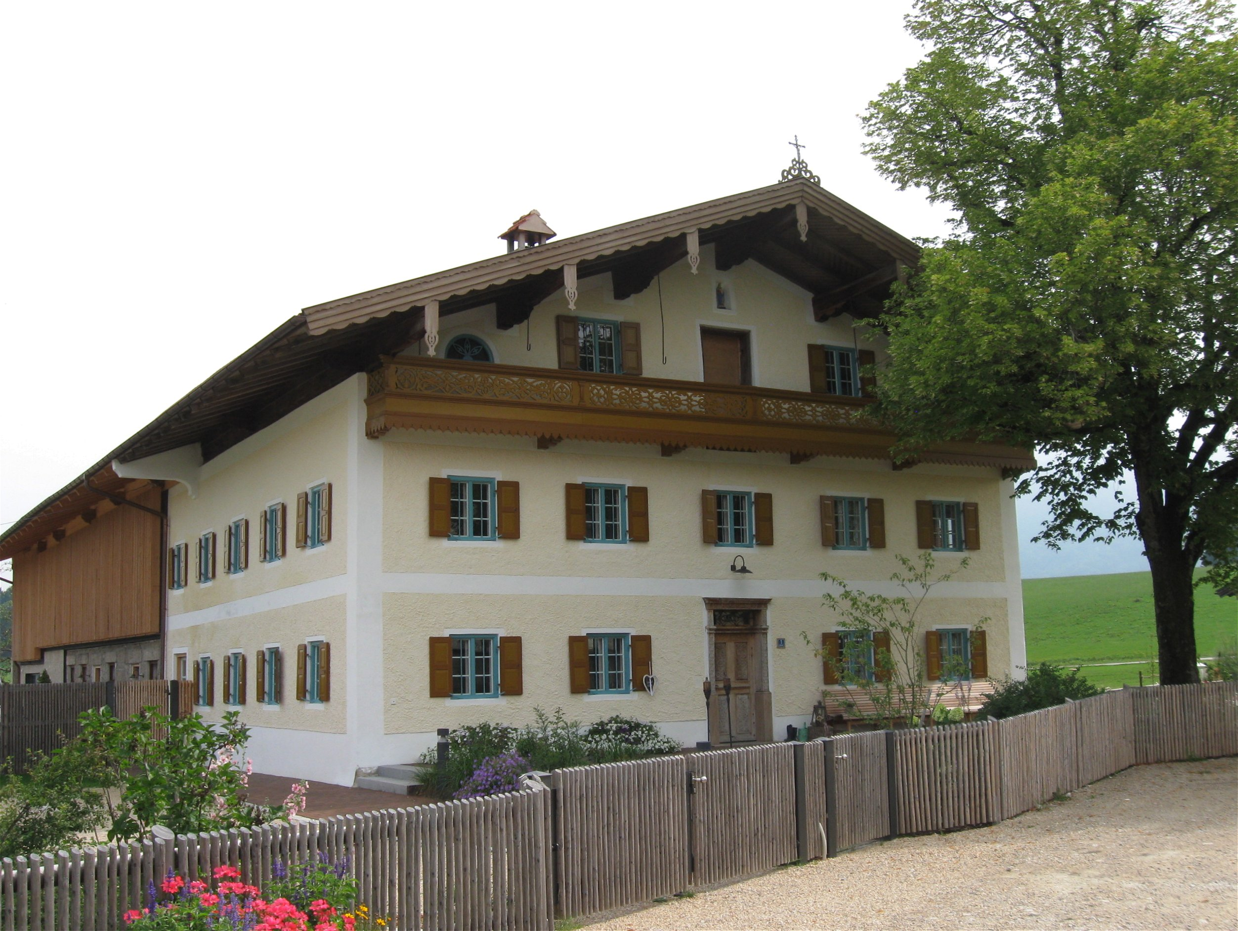 Roßholzen Nr. 1; Bauernhaus mit Giebellaube und geschnitztem Türstock, bez. 1848.